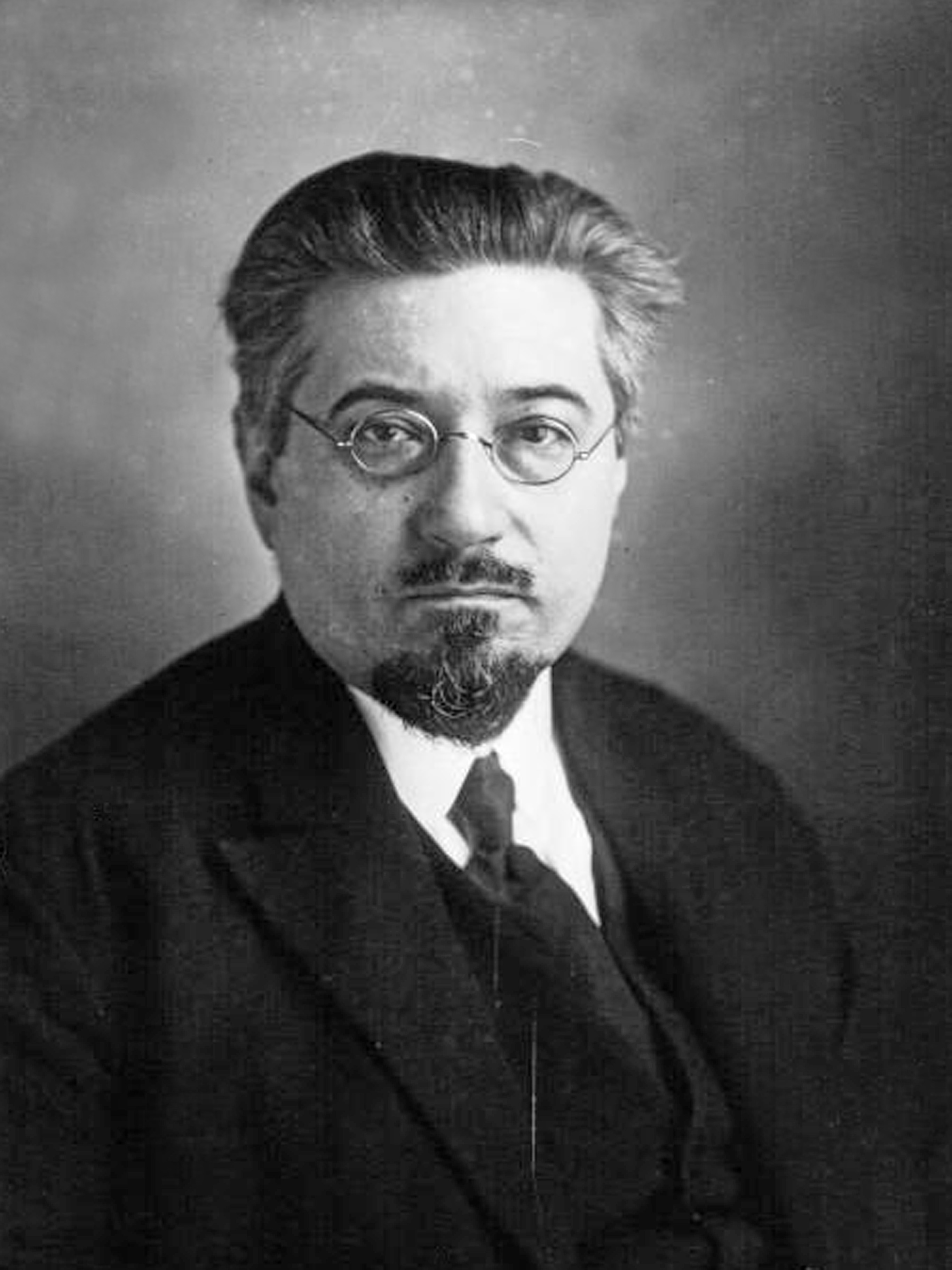 Paul Ramadier, député (Aveyron) [photographie de presse]